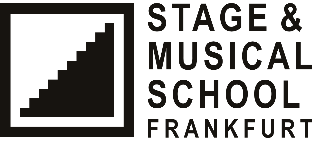 Das Logo der Stage & Musical School Frankfurt. Eine Berufsschule für Musical und Schauspiel in Frankfurt.